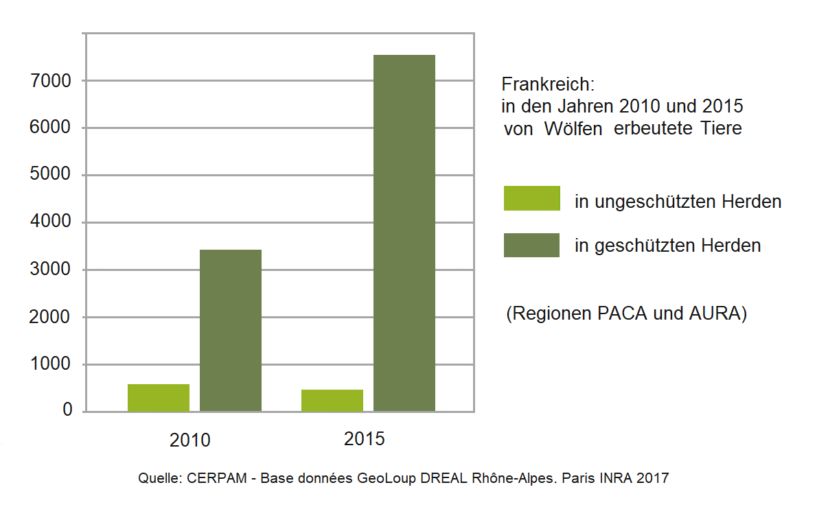 In Frankreich in den Jahren 2010 und 2015 von Wölfe erbeutete Tiere in ungeschützen und geschützten Herden